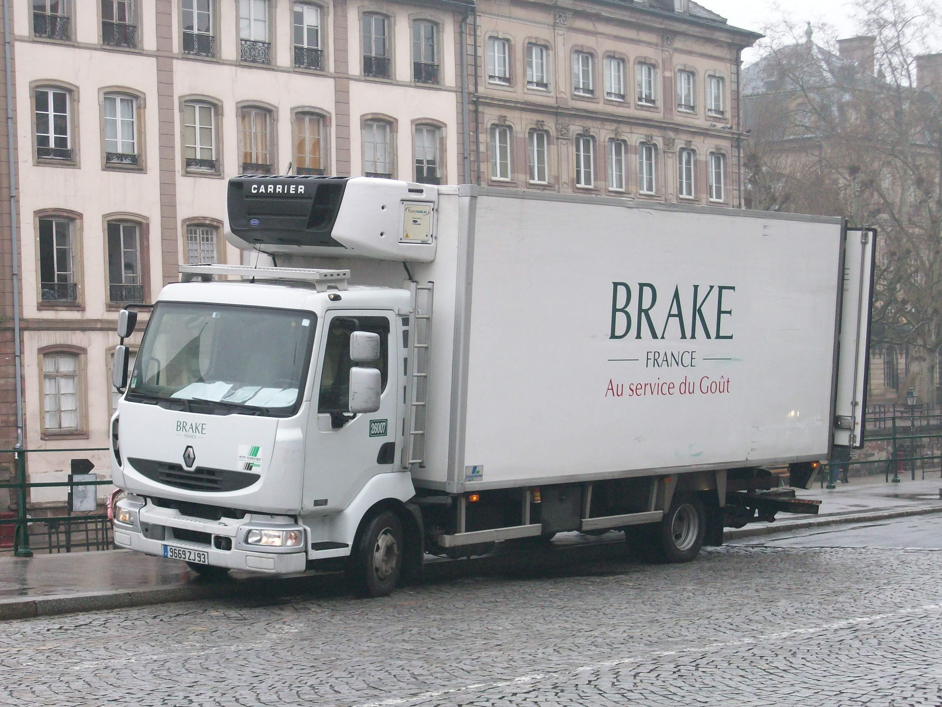 Renault Midlum en livraison, place du Corbeau à Strasbourg